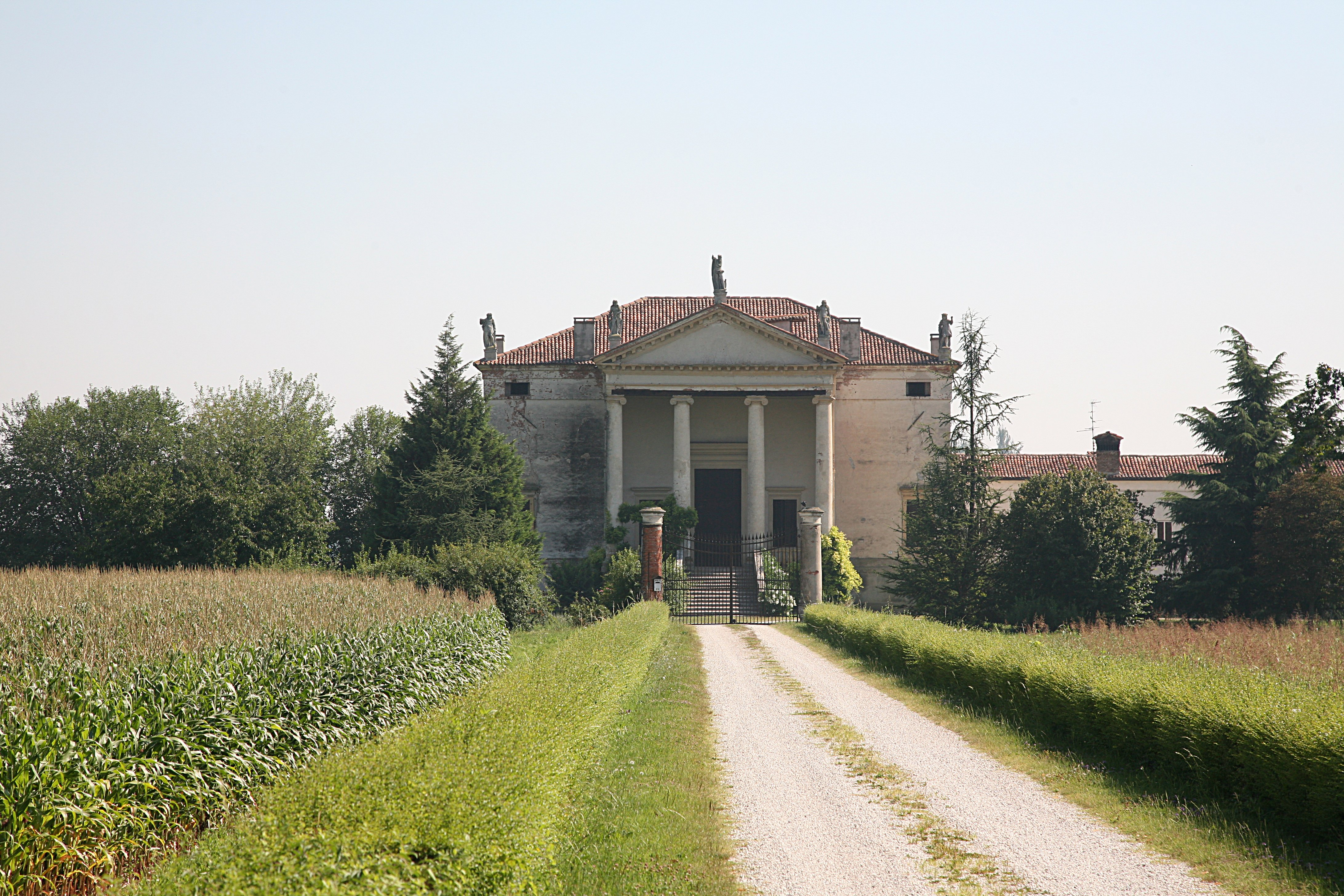 Villa Chiericati Da Porta Rigo by Andrea Palladio